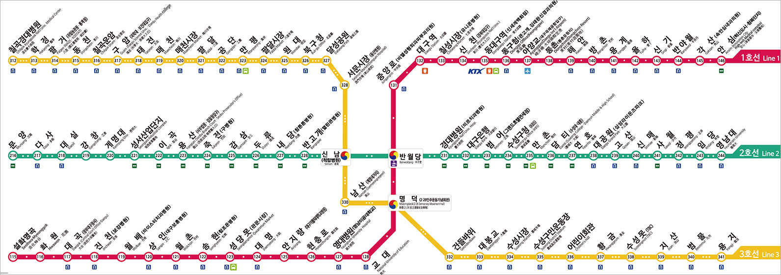 대구 도시철도 노선도